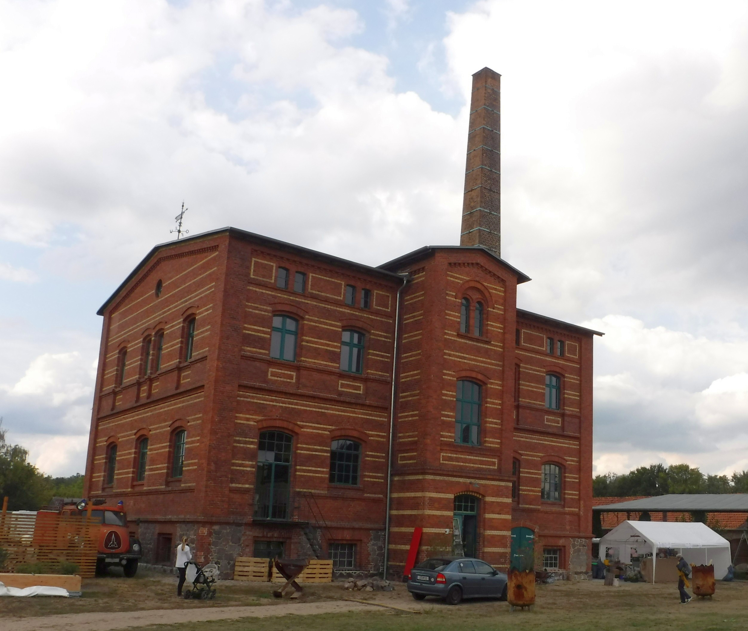 Brennerei des Gutshofs Genshagen